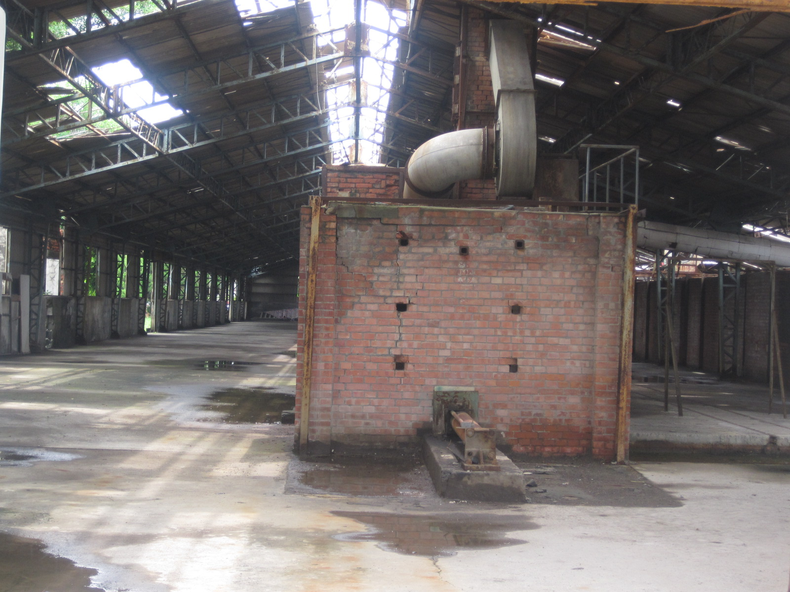 中都唐榮磚窯廠內部，似乎是隧道窯的背面。